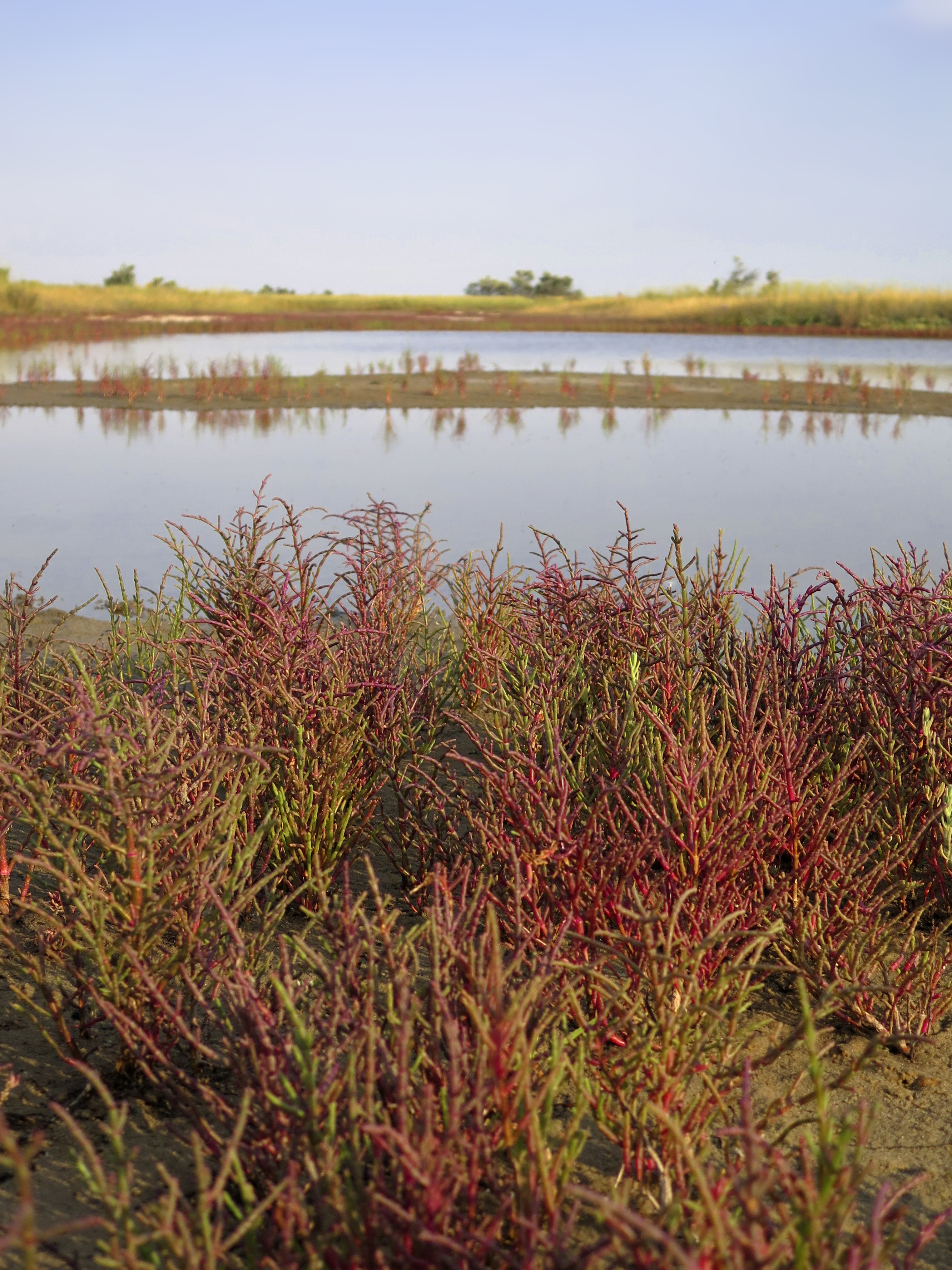 Національний природний парк «Білобережжя Святослава», Очаківський, Березанський р-ни